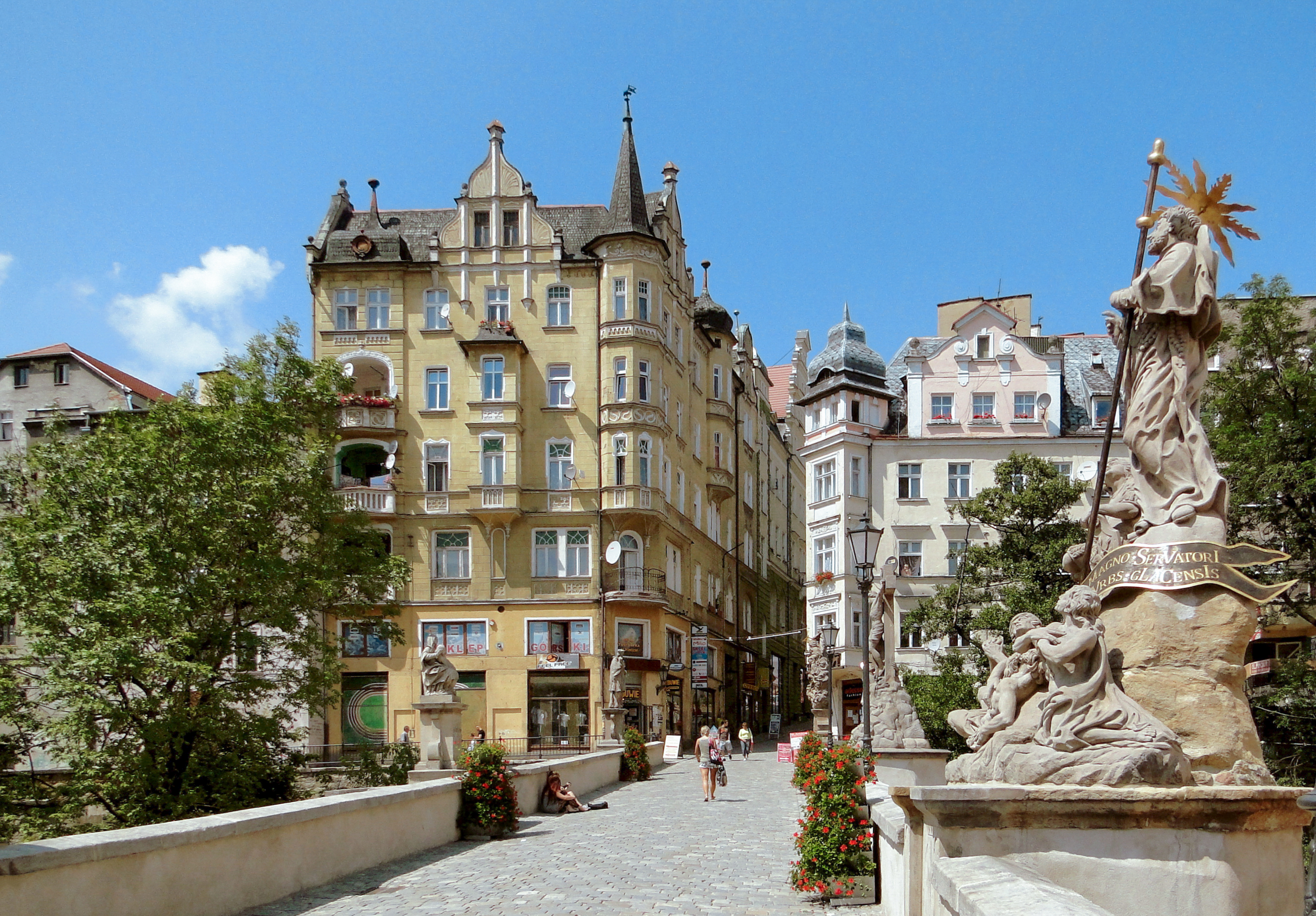 Kłodzko, Most na Młynówce- Widok na Stare Miasto